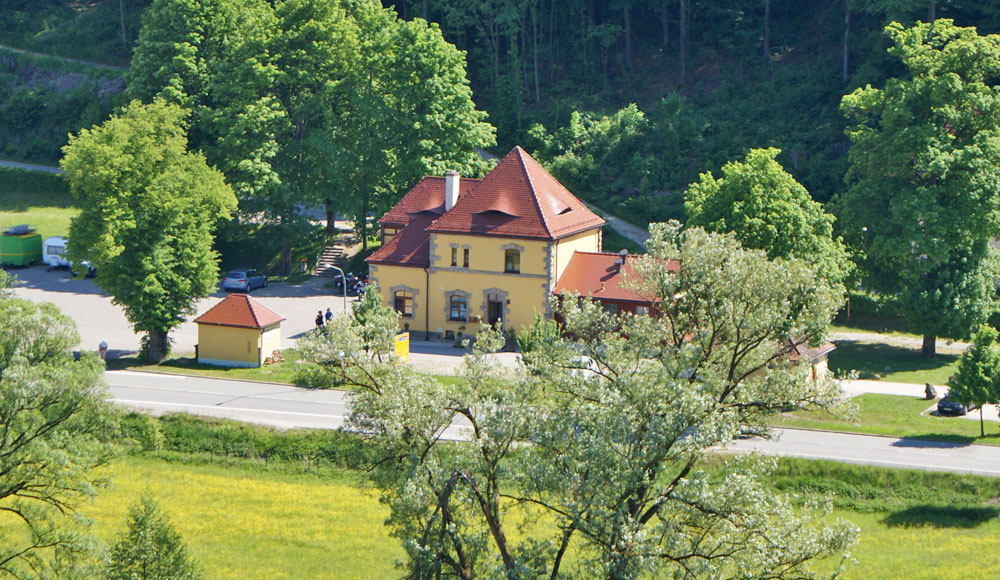 Der ehemalige Bahnhof in Kastl (Lauterachtal), Gesehen von der Klosterburg